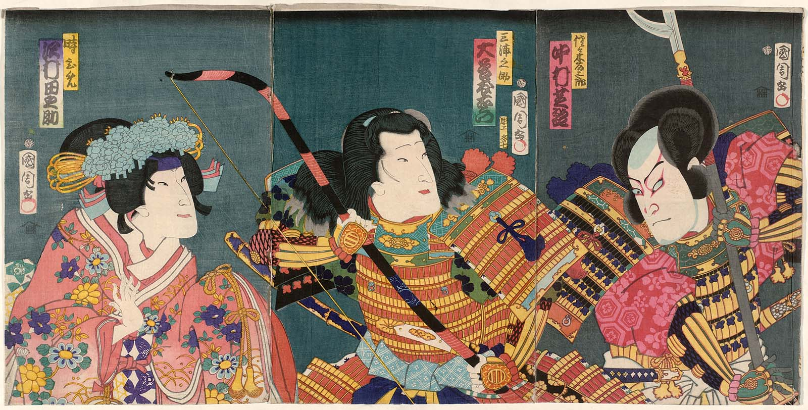 Kabuki Scene from "Kamakura Sandaiki", Act 7 （『鎌倉三代記』七段目より）